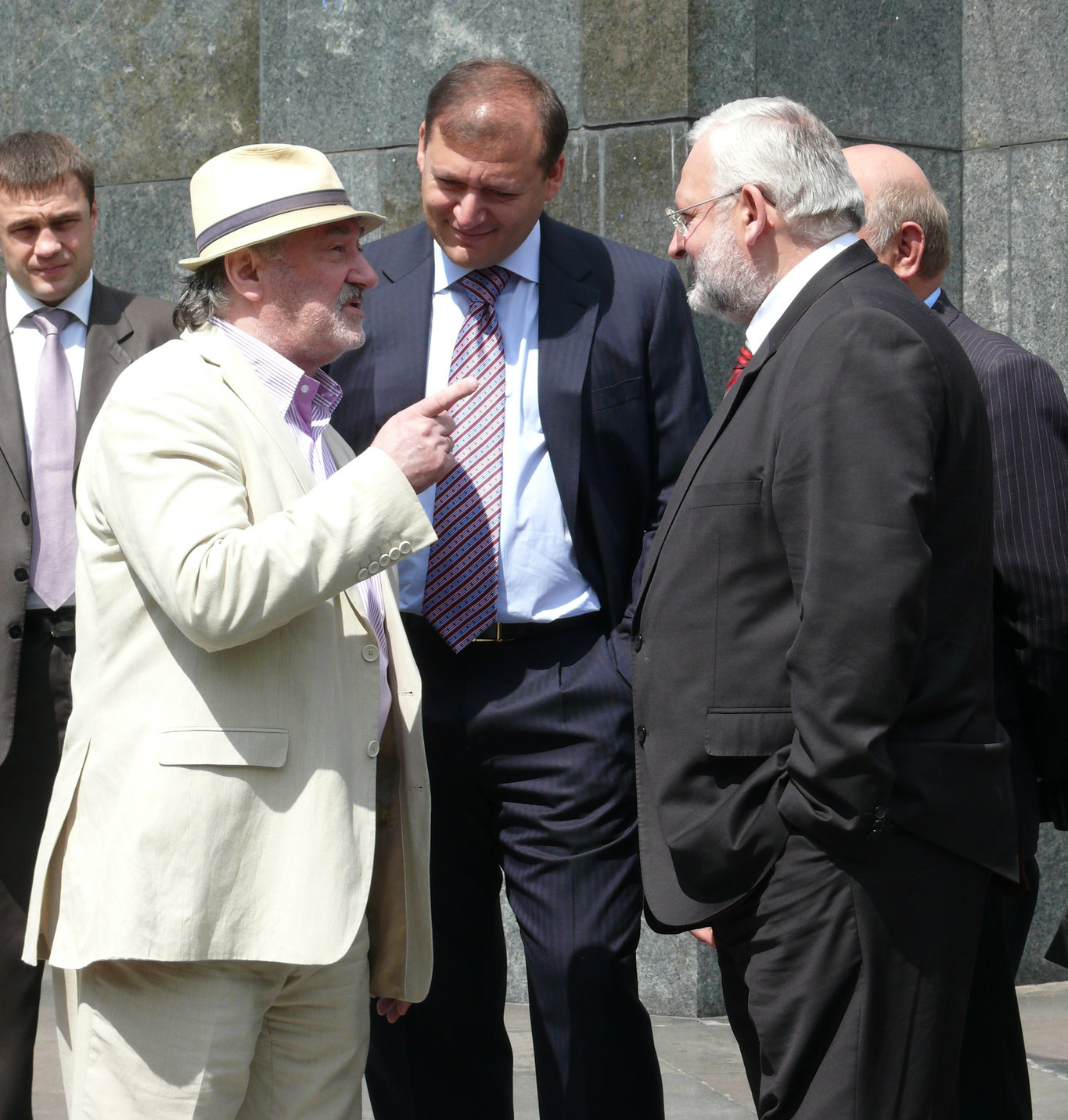 Городской голова Харькова Михаил Добкин и вице-мэр Игорь Шурма на прогулке с участниками кинофестиваля "Харьковская сирень" по Саду Шевченко вместе с актёром Богданом Ступкой, который в шляпе, возле памятника Шевченко.